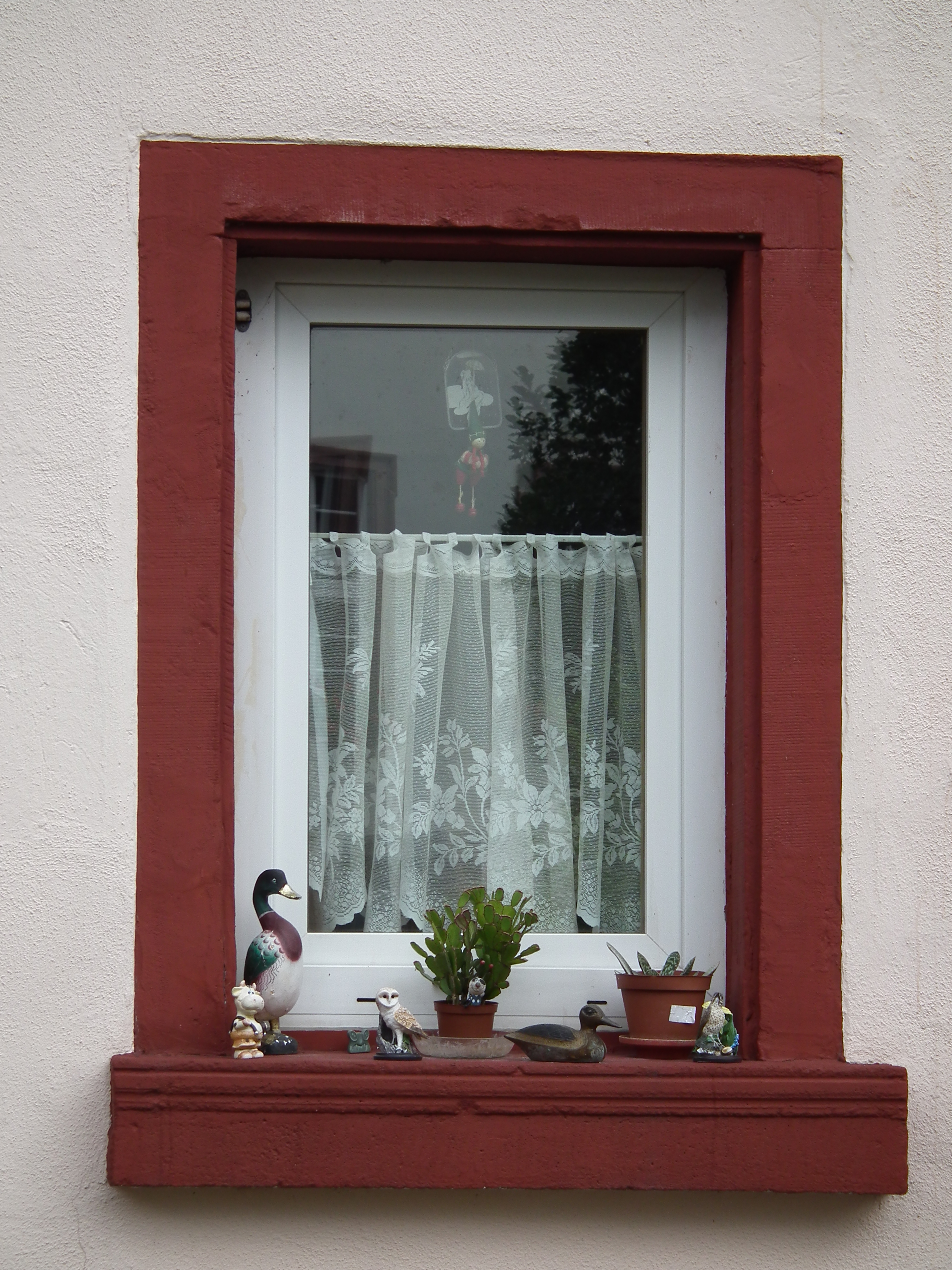 Dekoartikel und Pflanzen auf Fenstersims, fotografiert in Guntersblum (Rheinland-Pfalz, Deutschland)